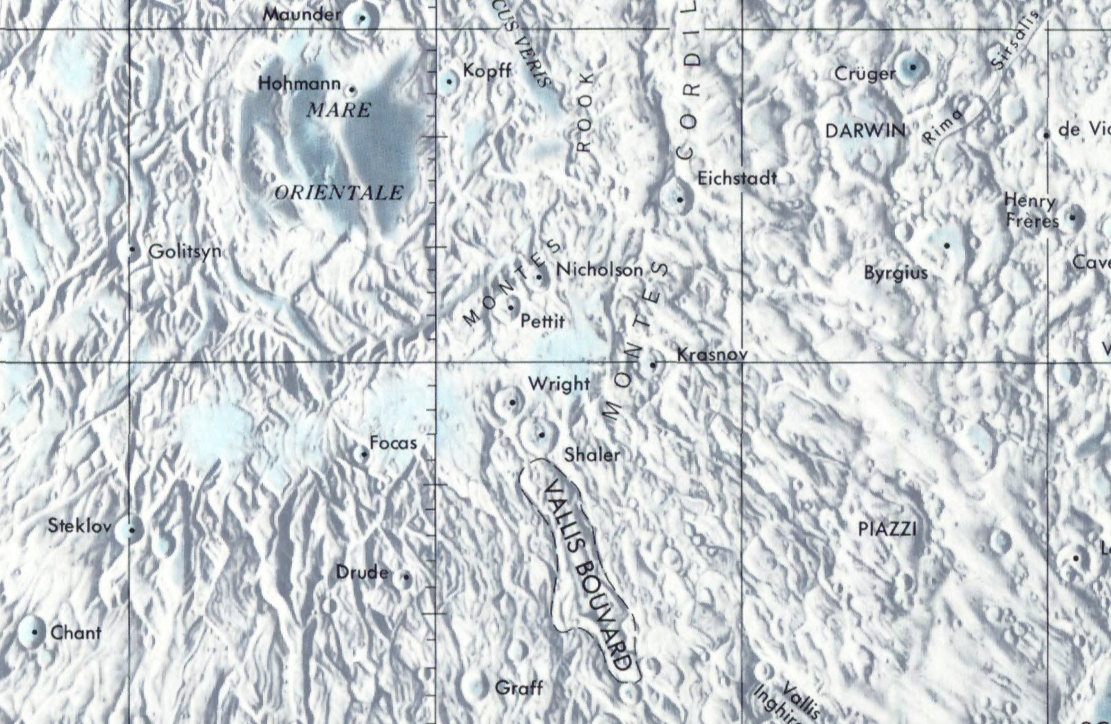 Cráter lunar Shaler. Localización. (Lunar Chart LPC1. Second Edition)